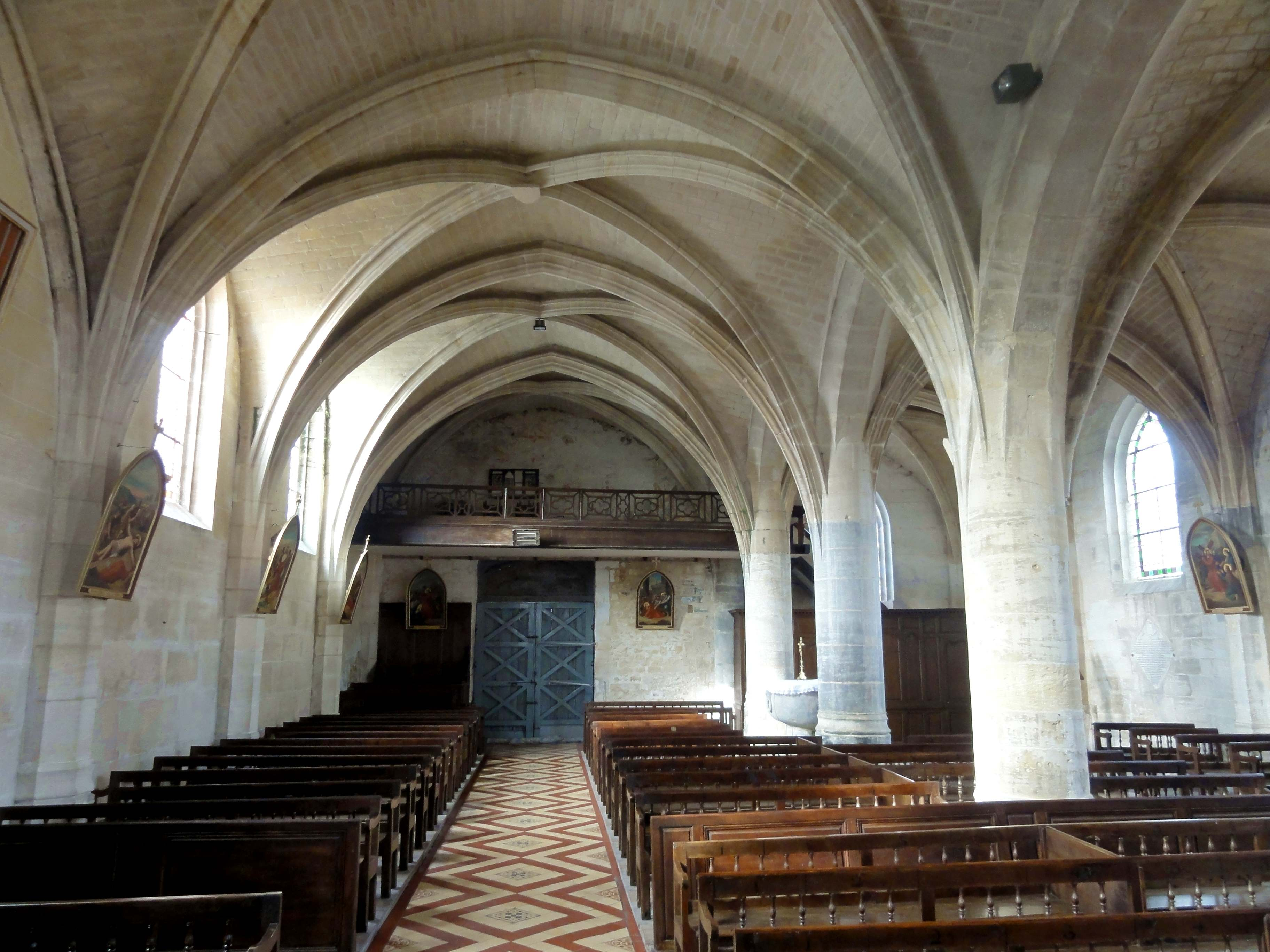 Voir titre.